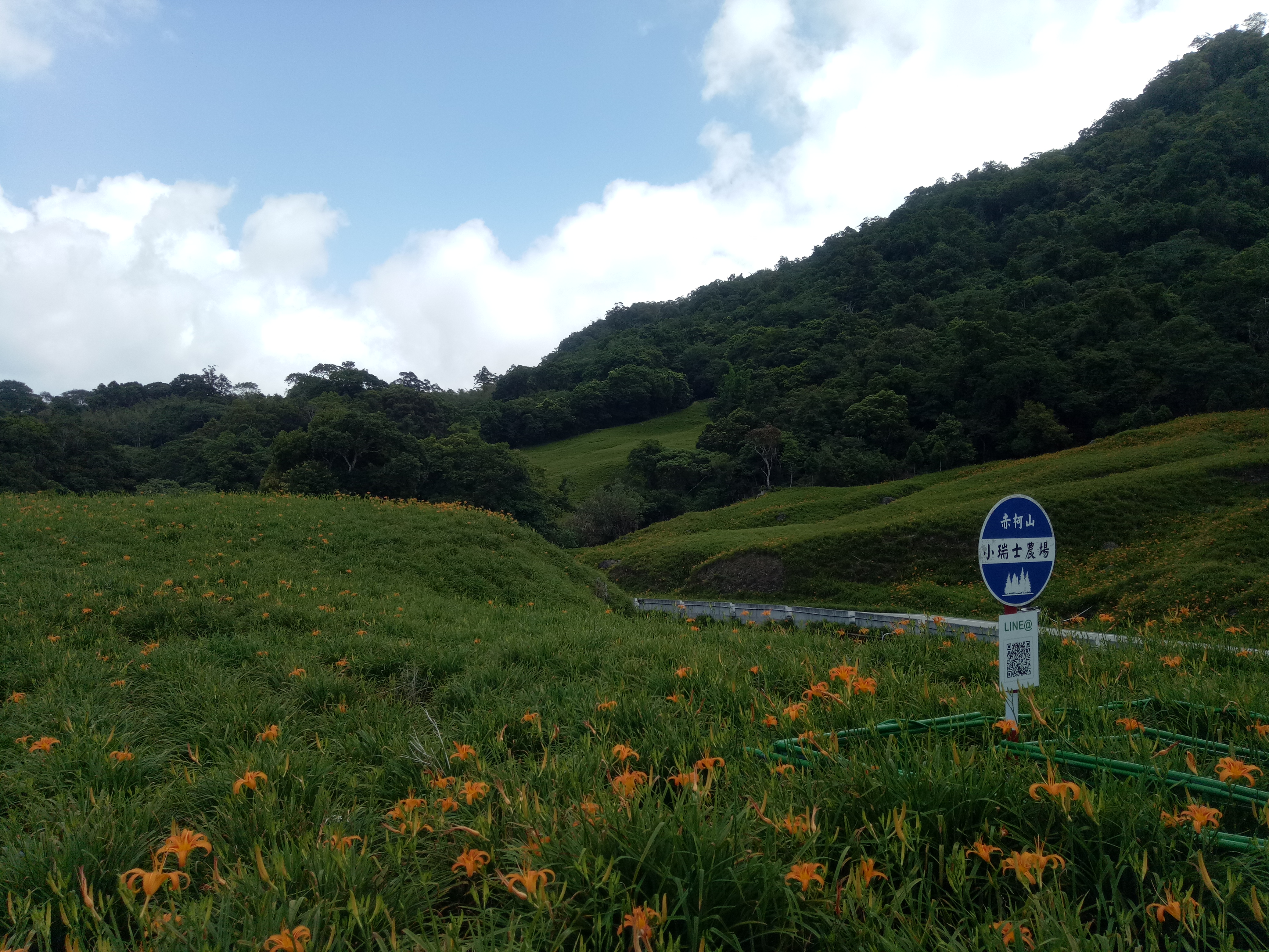 台灣花蓮縣玉里鎮赤科山 小瑞士農場。